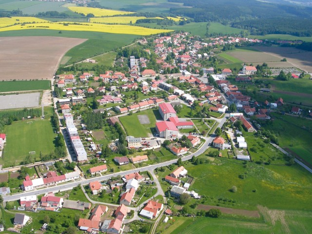 Minimapka protivanova